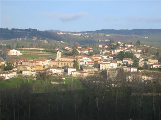 Le village de Chambost-Longessaigne (Rhône)